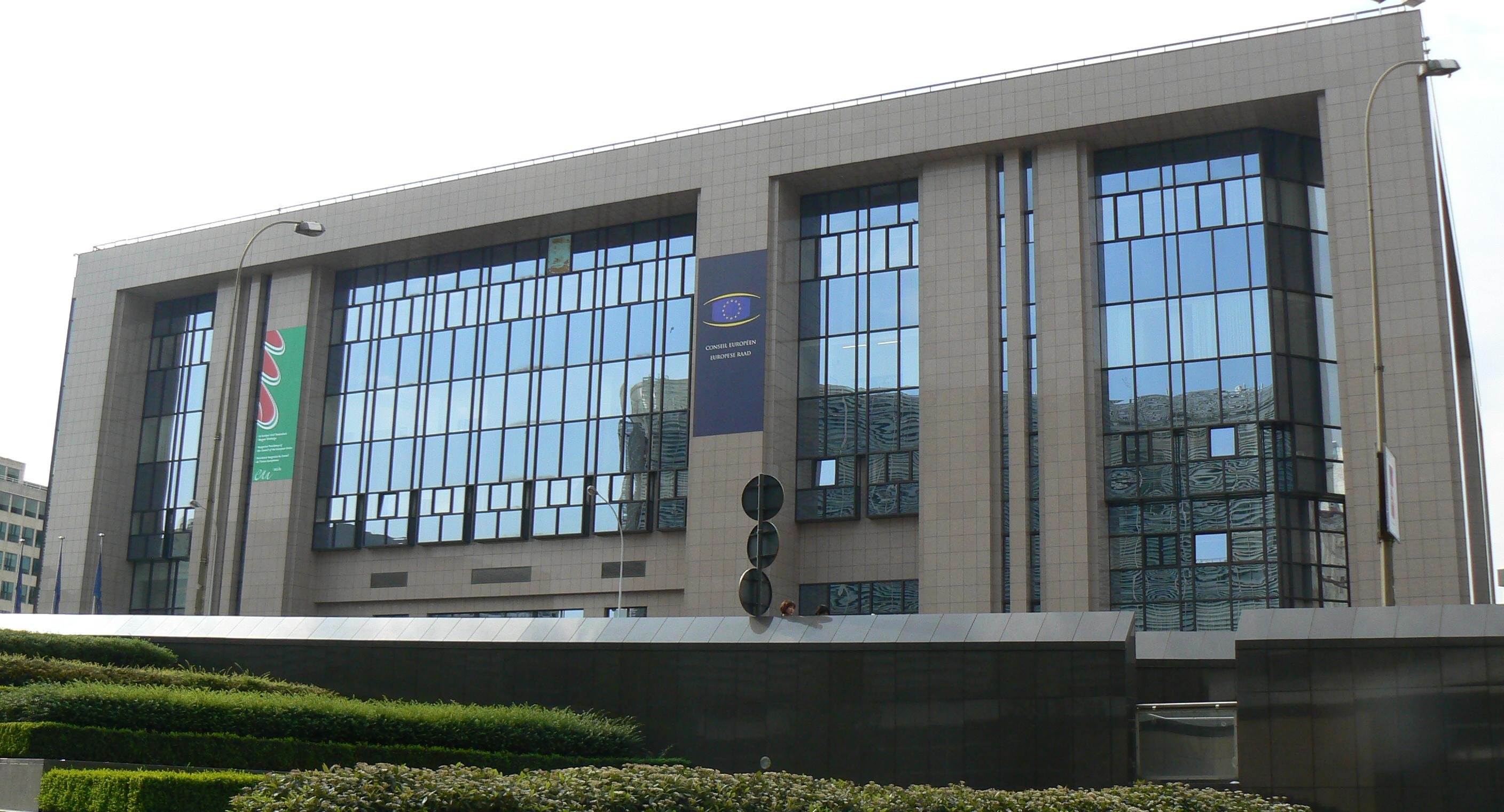 European council building in Brussels, rue de la Loi.